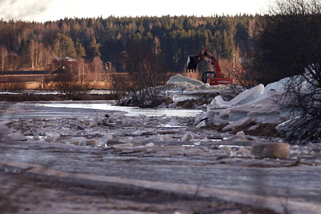 Malisjoen alajuoksun kevättulva vuonna 2013.